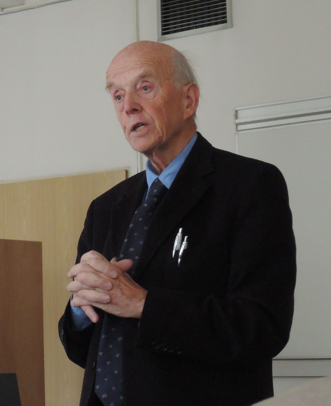 Prof. Dr. Ivan Hlaváček, pedagog, historik a archivář